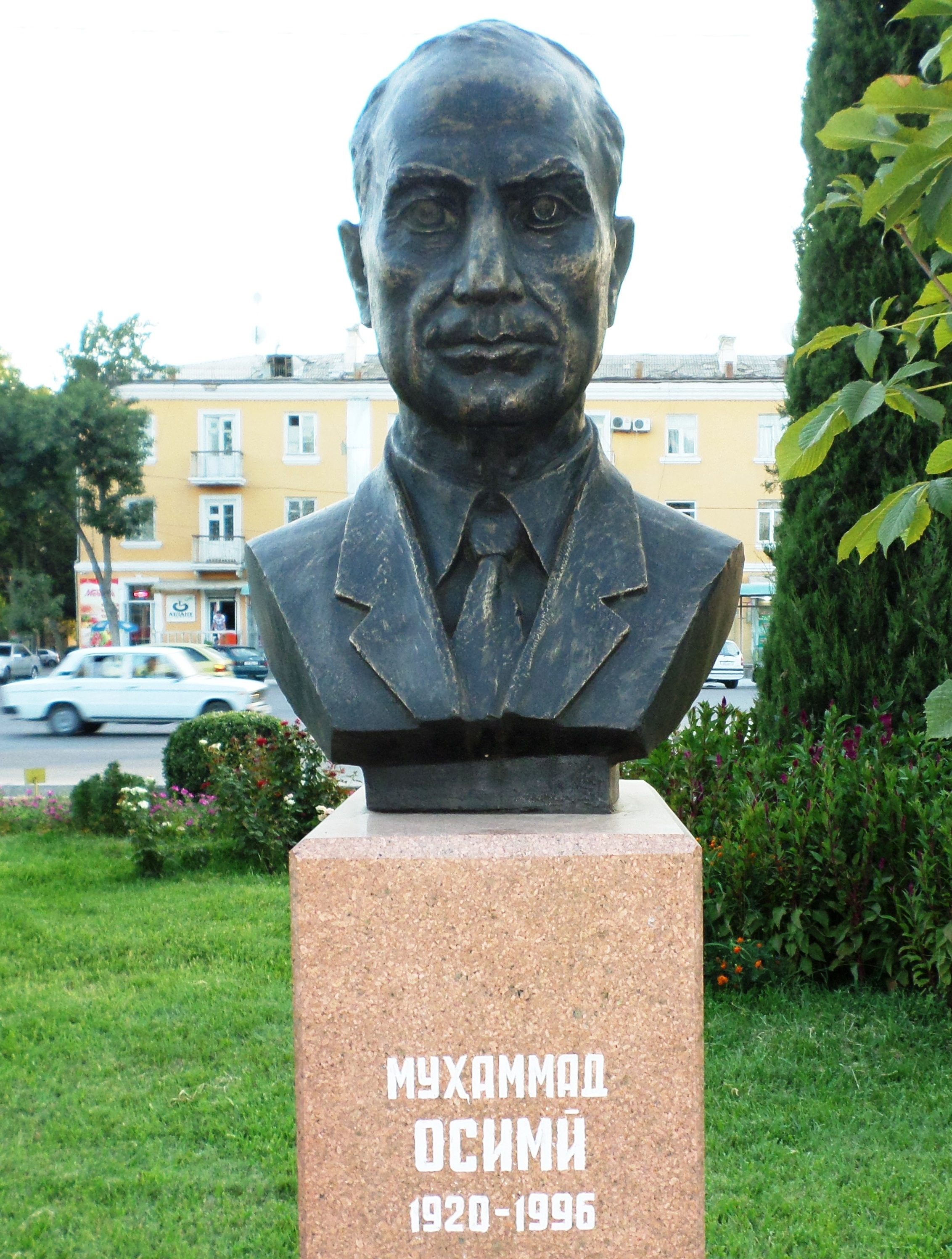 Мухаммад Осими - учёнҷй,государственный деятель Таджикской ССР.Президент АН Таджикской ССР Тоҷикӣ: Муҳаммад Осими- олим, ходими давлатии ҶШС Тоҷикистон ва Ӯзбекистон. Президенти АИ ҶШС Ӯзбекистон